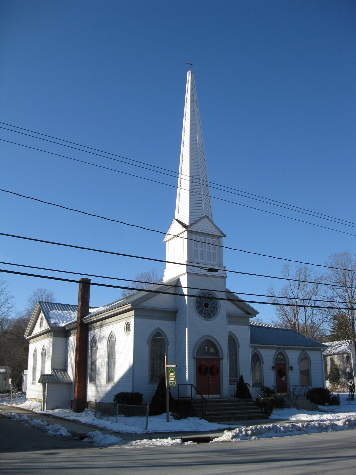 Ellenville, New York